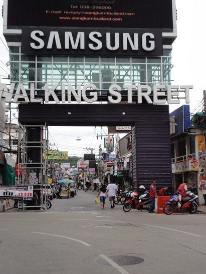 Entrée de walkingstreet , pattaya en 2011.